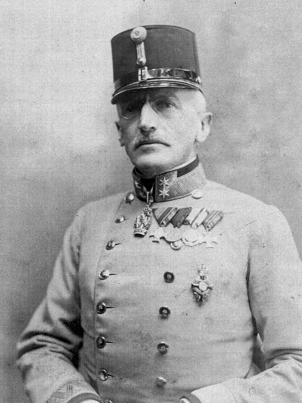 general pješaštva, podmaršal Ivan grof Salis-Seewis (1863.-1940.)